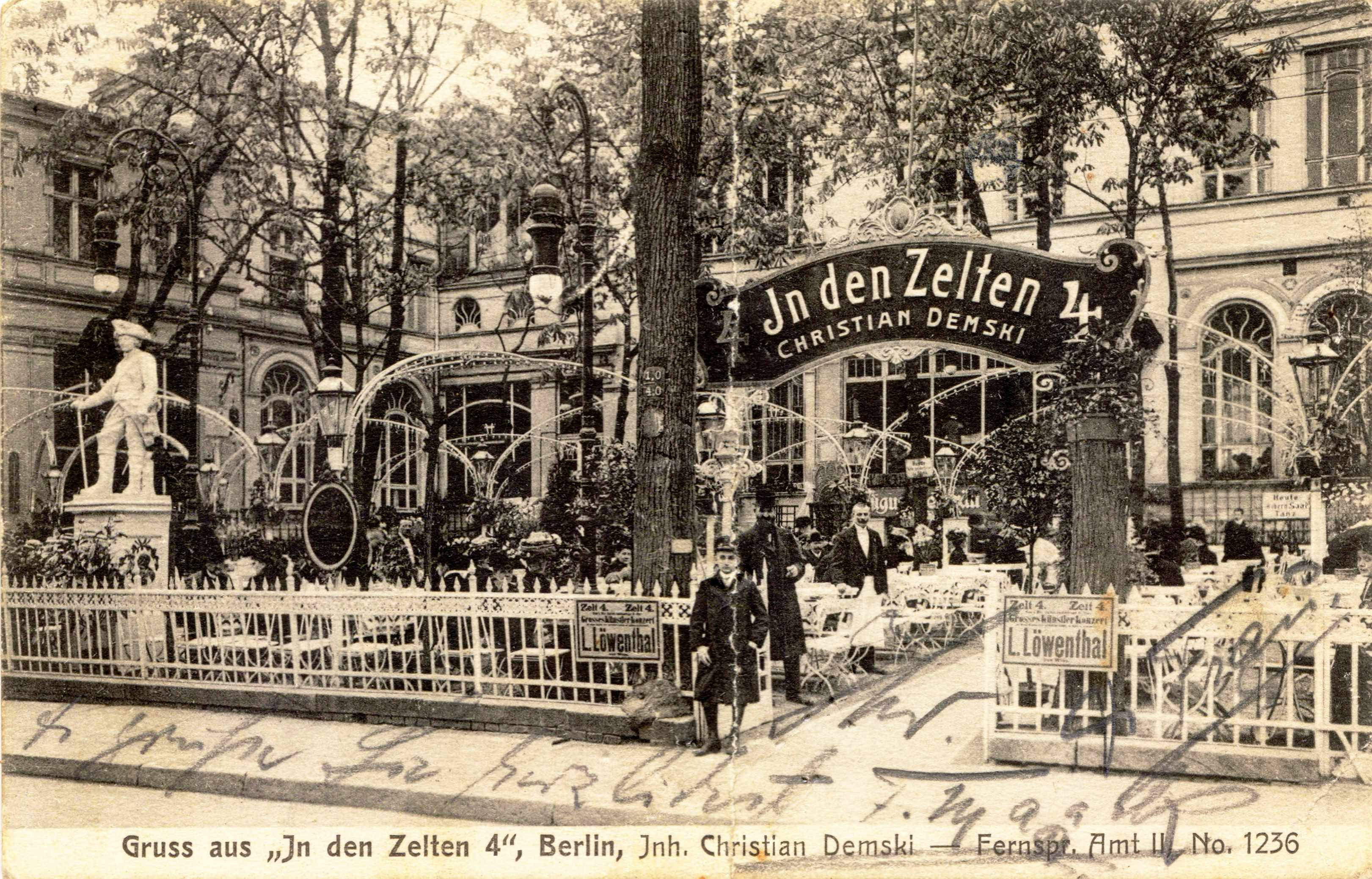 Berlin, In den Zelten around 1900